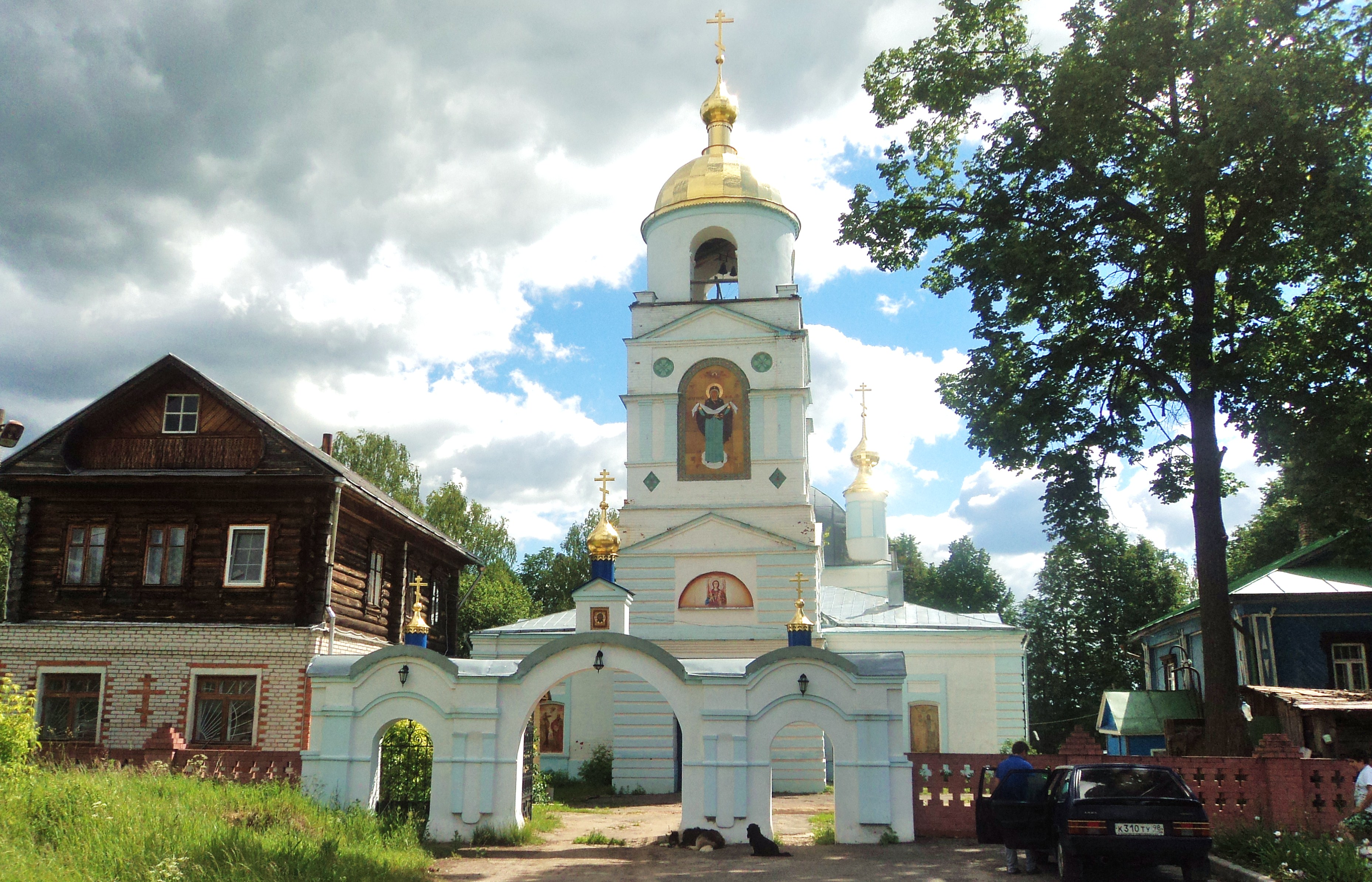 Церковь: Нагуево, Вязниковский район, Владимирская область